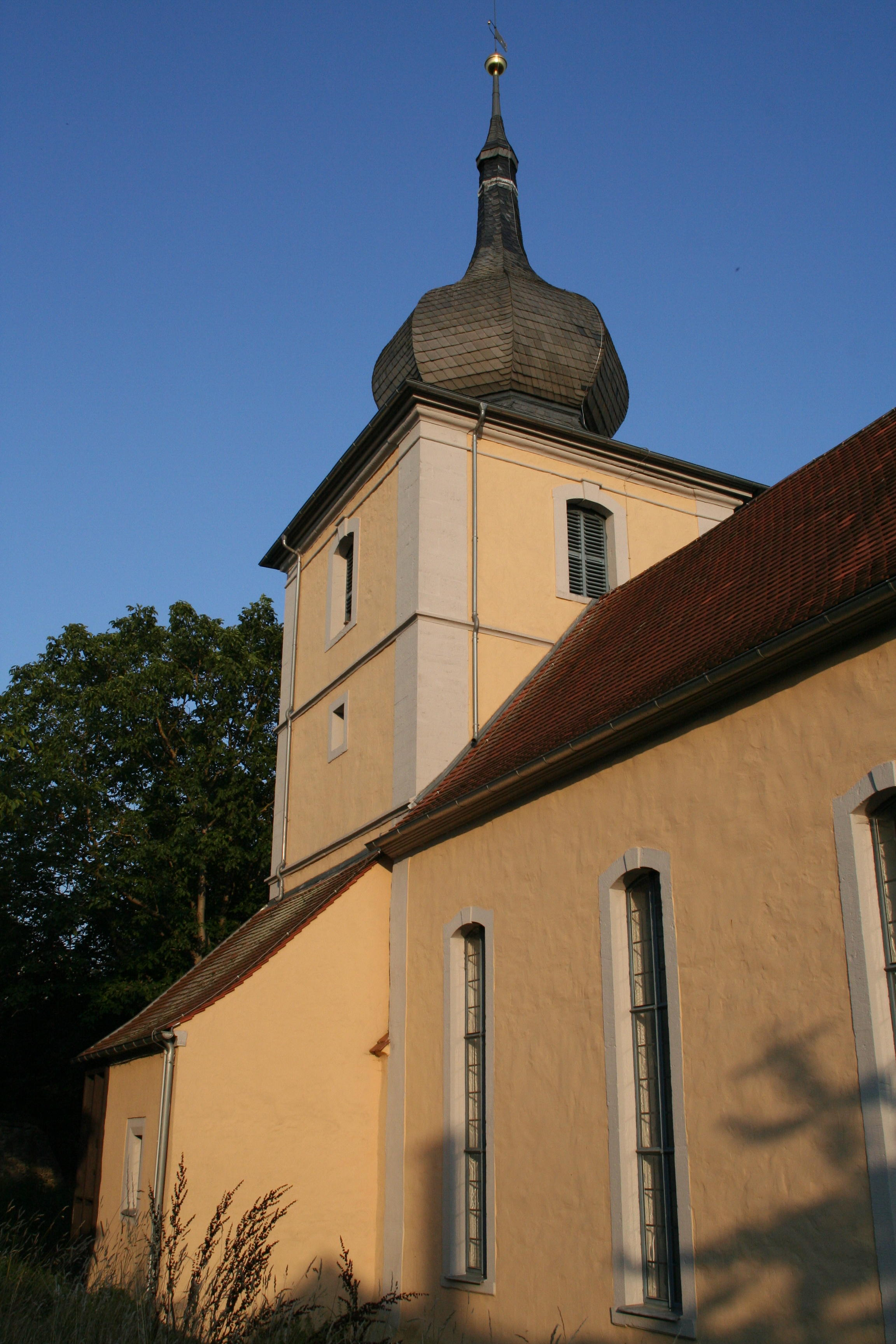 Evangelische Filialkirche St. Bartholomäus in Ottowind, Landkreis Coburg